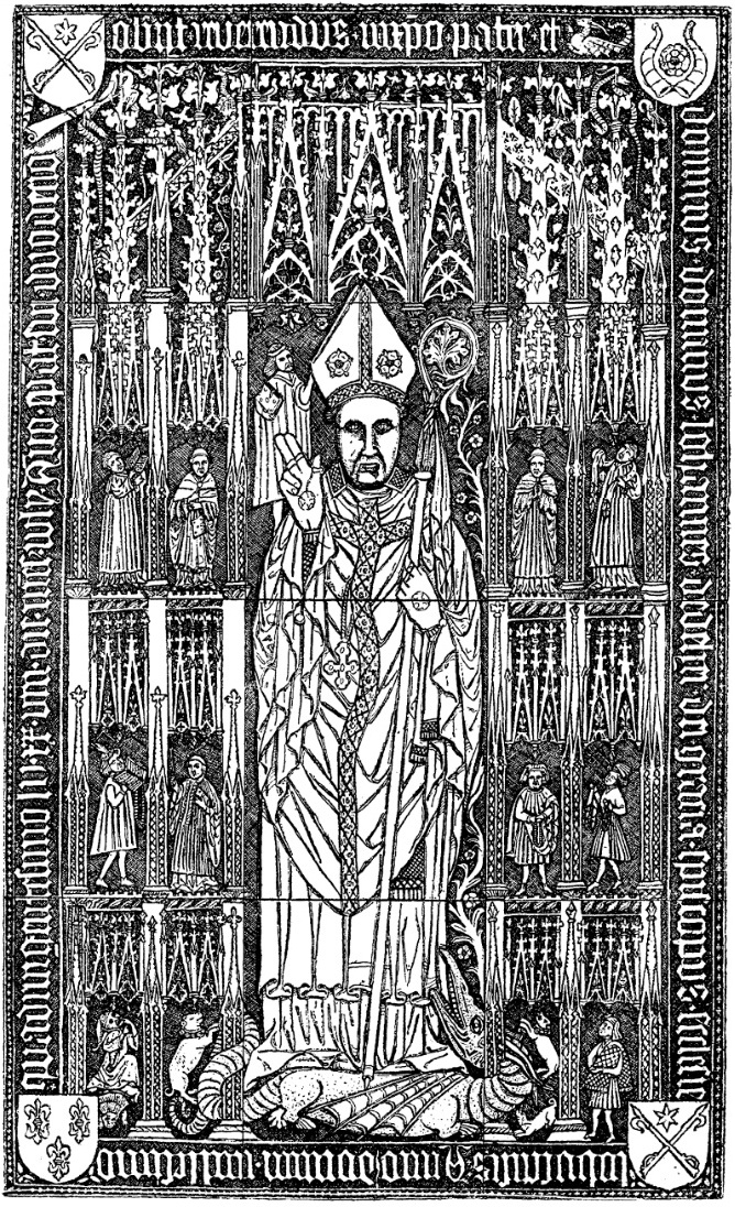 Zeichnung (1885) des Epitaphs von Johannes von Deher, Bischof von Lebus 1443-1455, im Fürstenwalder Dom. Interessant ist die Ähnlichkeit mit diesem Epitaph von 1456.